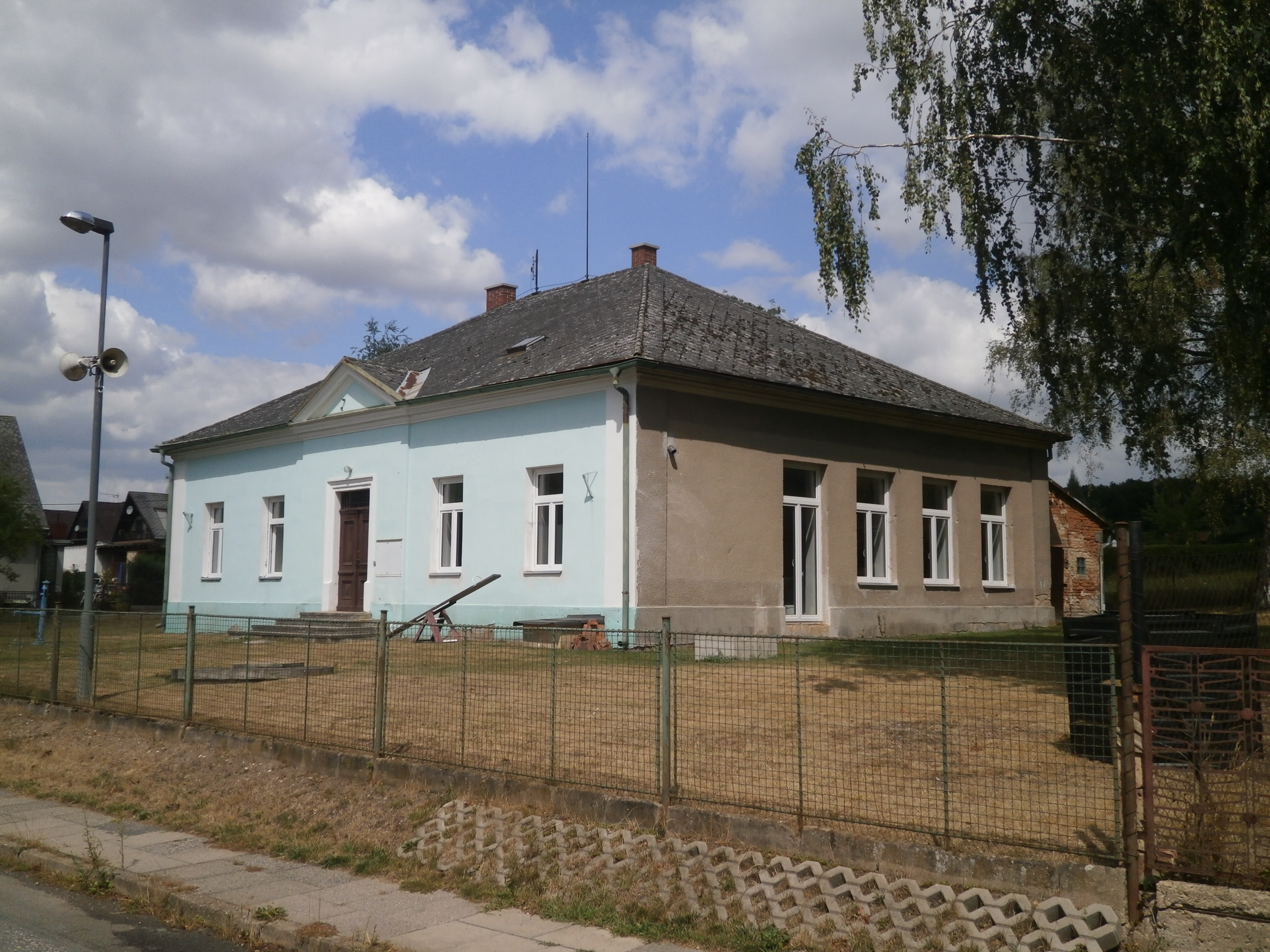 Bechov - č.p. 25